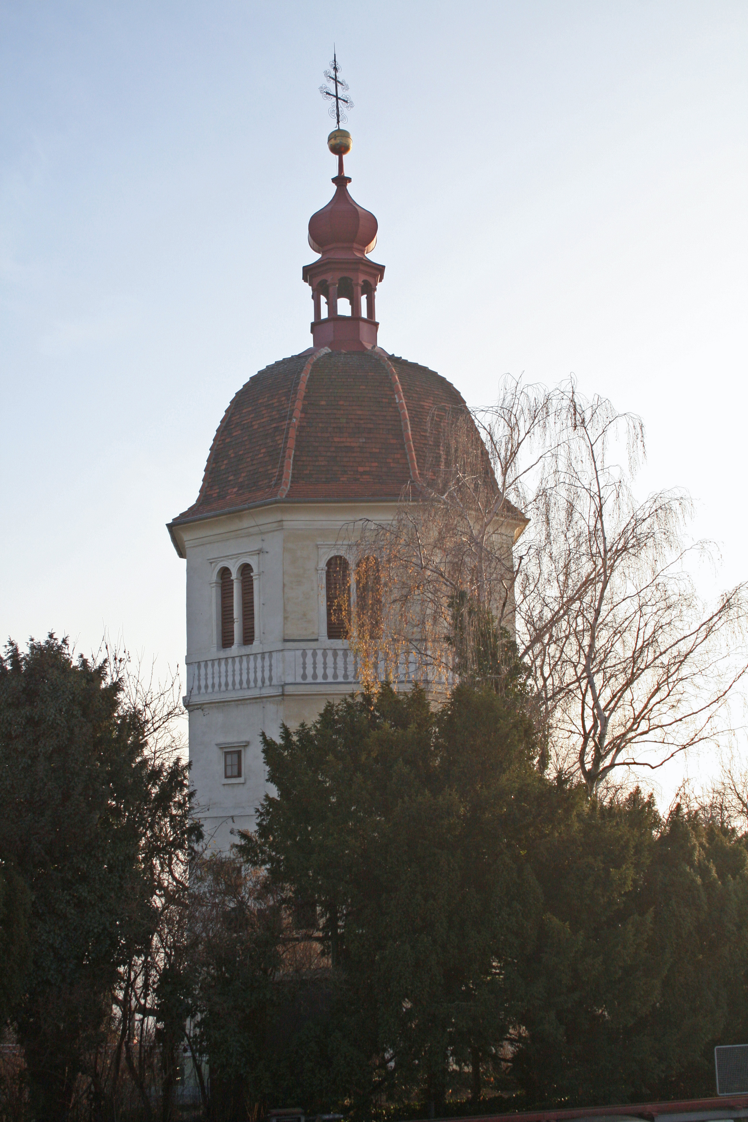 Graz, Austria: Glockenturm am Schlossberg